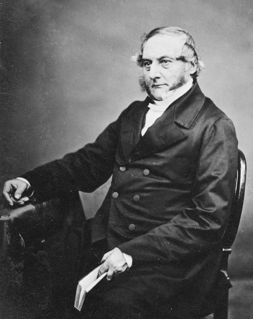 William Webster Fisher